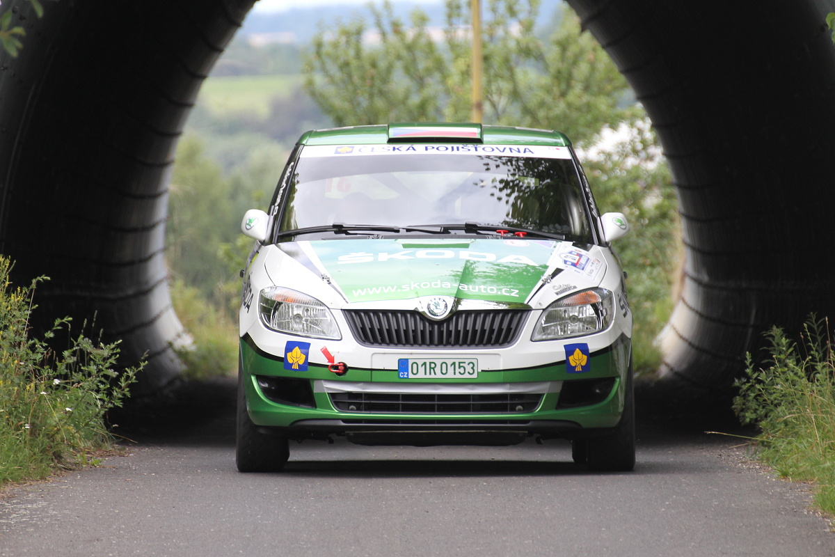 VRKOSLAV Jiří / RADA Jiří, Škoda Fabia R2, Rally Bohemia 2012